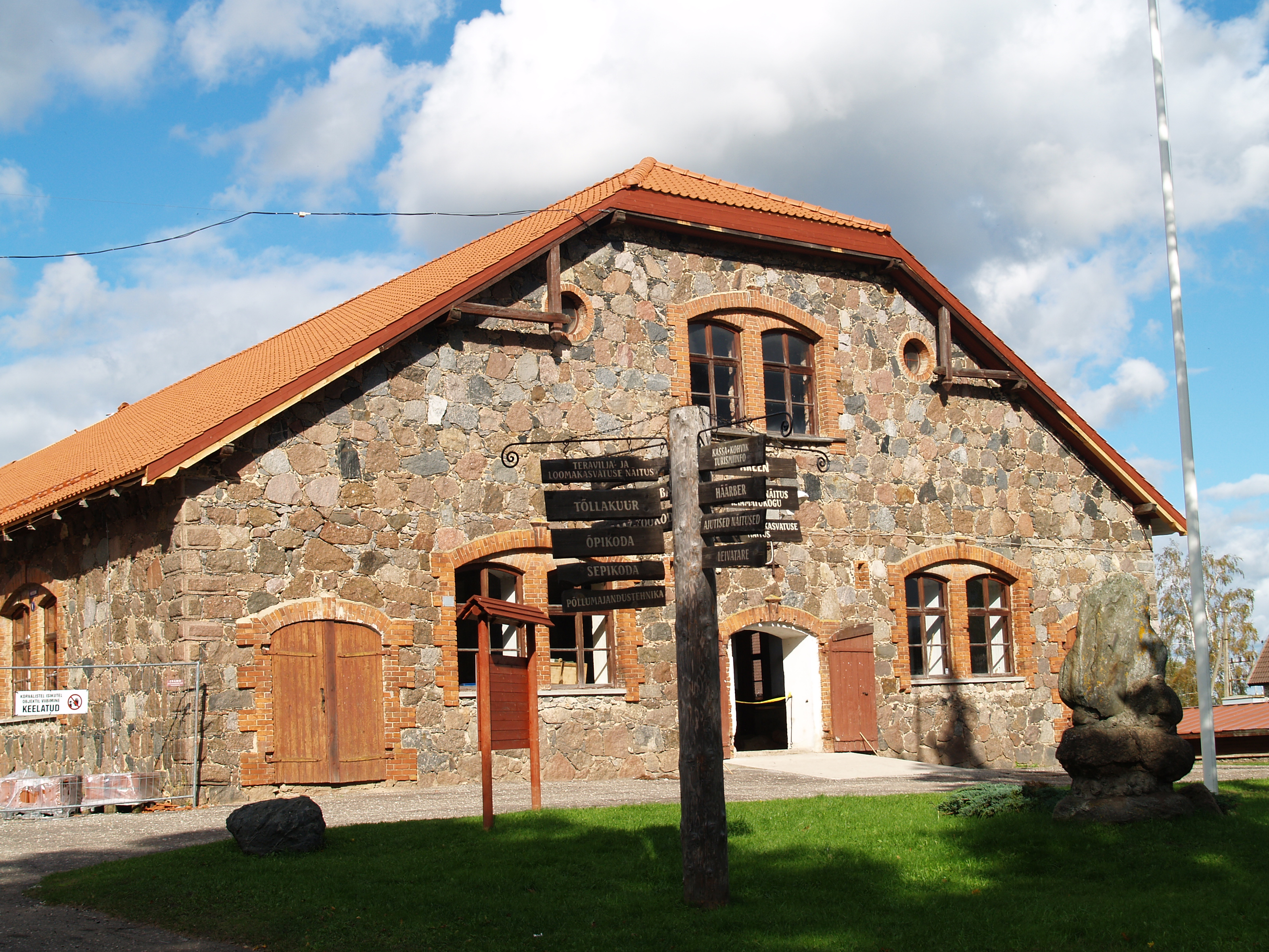 Ülenurme mõisa laut, Eesti Põllumakandusmuuseumi laut-ekspositsioonihoone